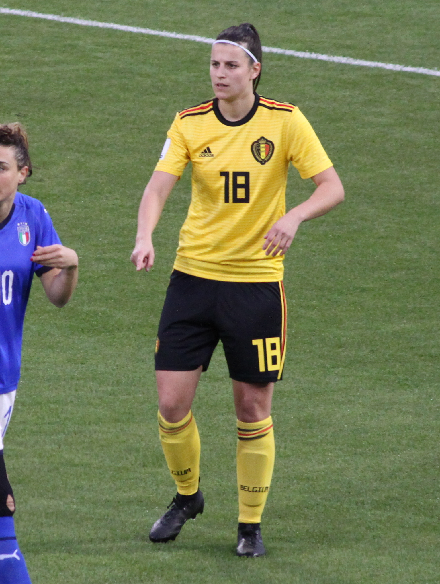 Laura De Neve, adifensore della nazionale di calcio femminile del Belgio, durante l'incontro Italia-Belgio del 10 aprile 2018 allo stadio Paolo Mazza di Ferrara.